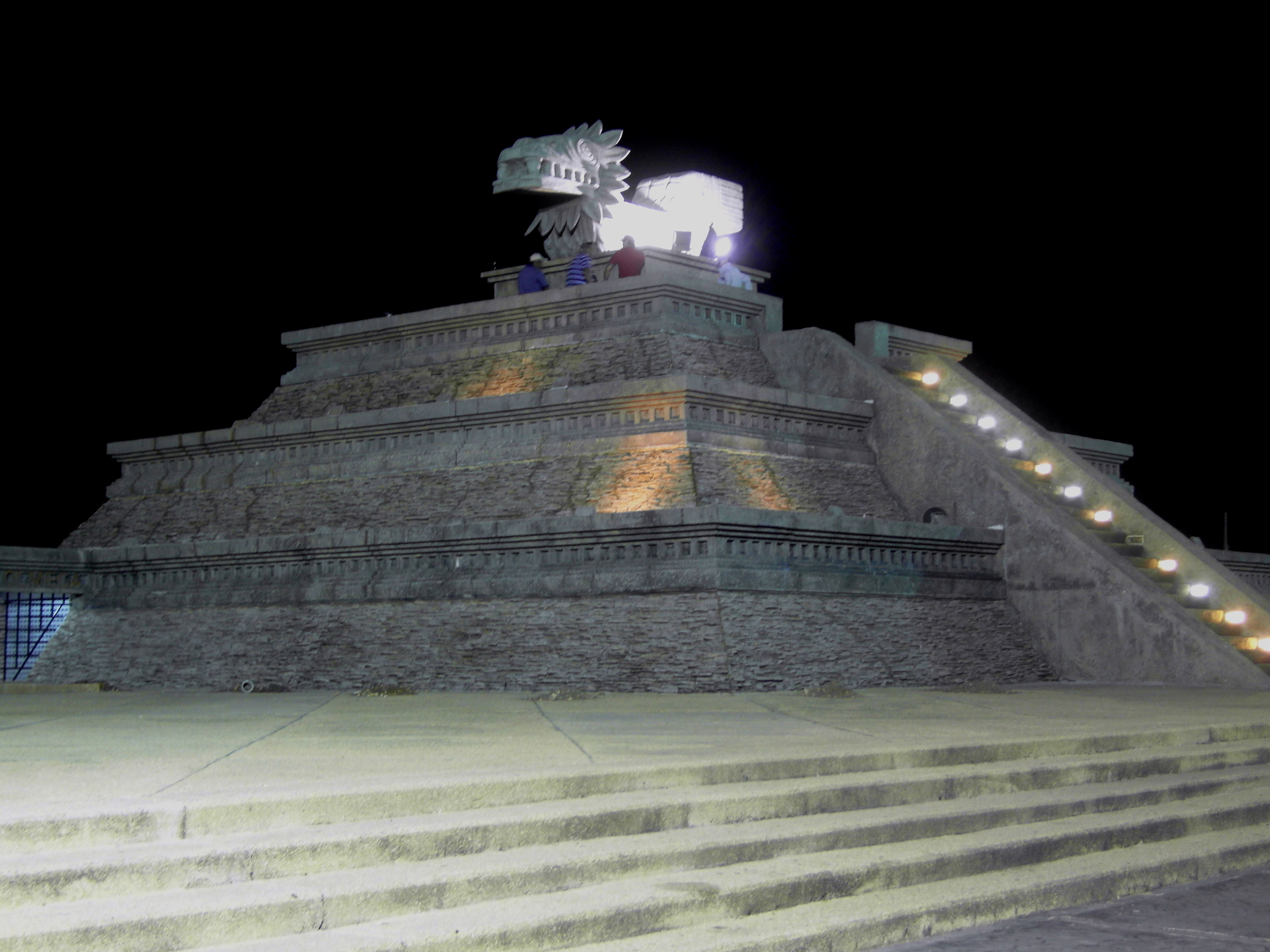 Centro del malecón en Coatza